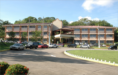 Edificio de Postgrado de la Universidad Tecnológica de Panamá